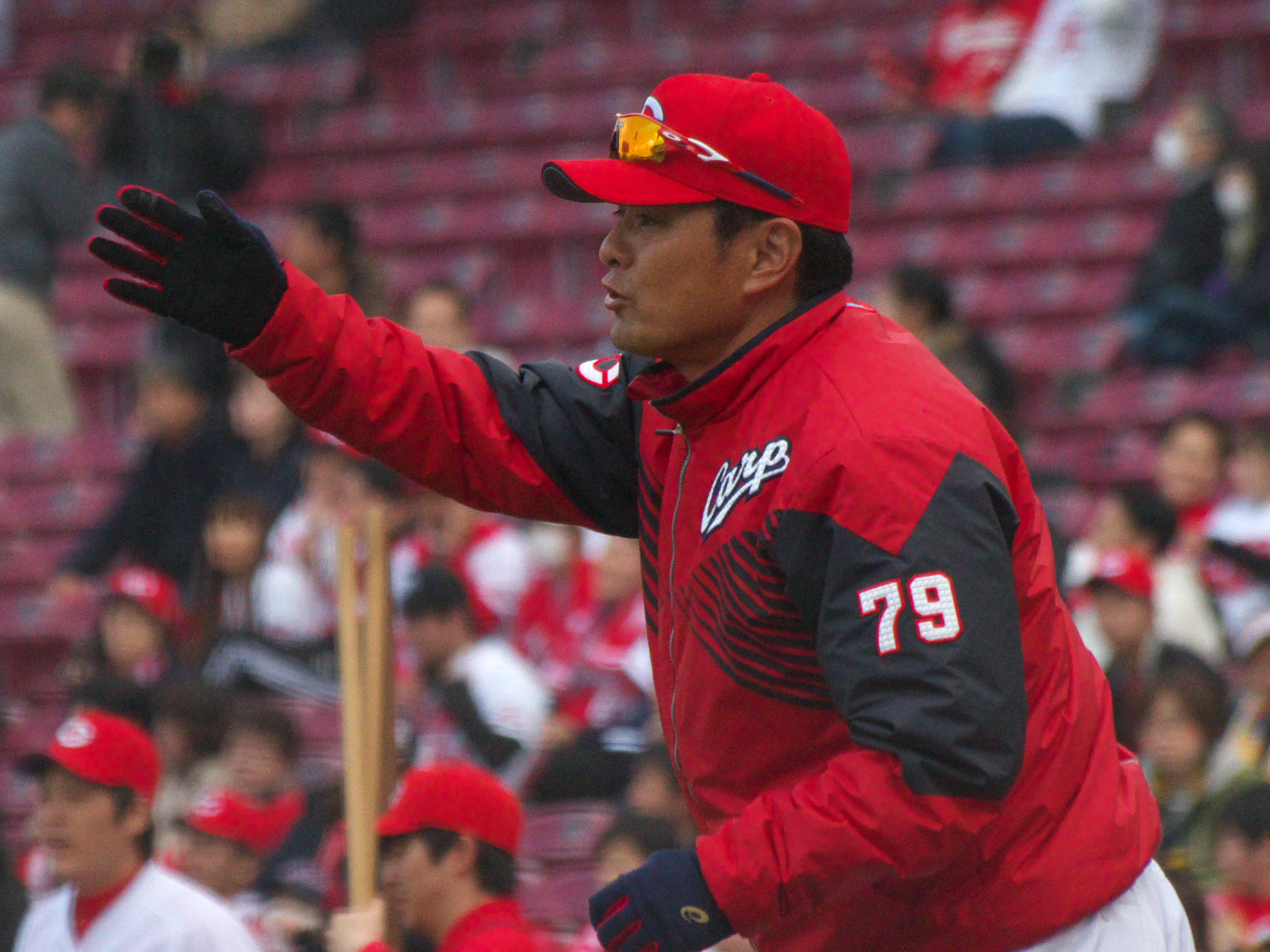 広島東洋カープ緒方孝市